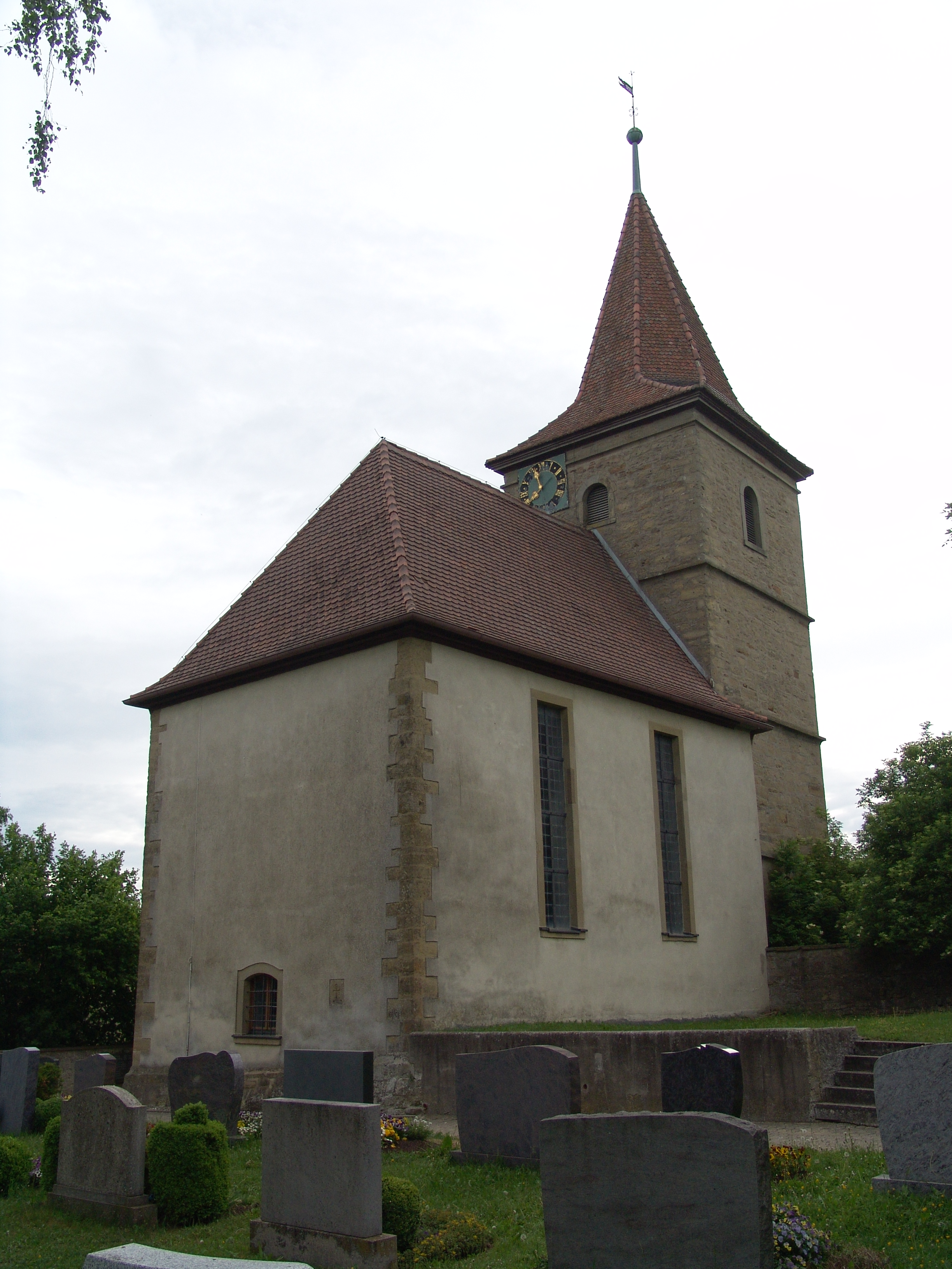 evang.luth. Kirche St. Nikolaus in Unterickelsheim